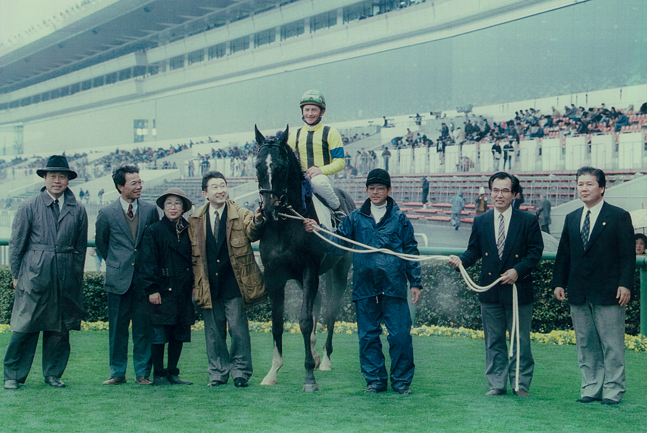 1995年03月26日 4歳未勝利 マイケル・ロバーツ